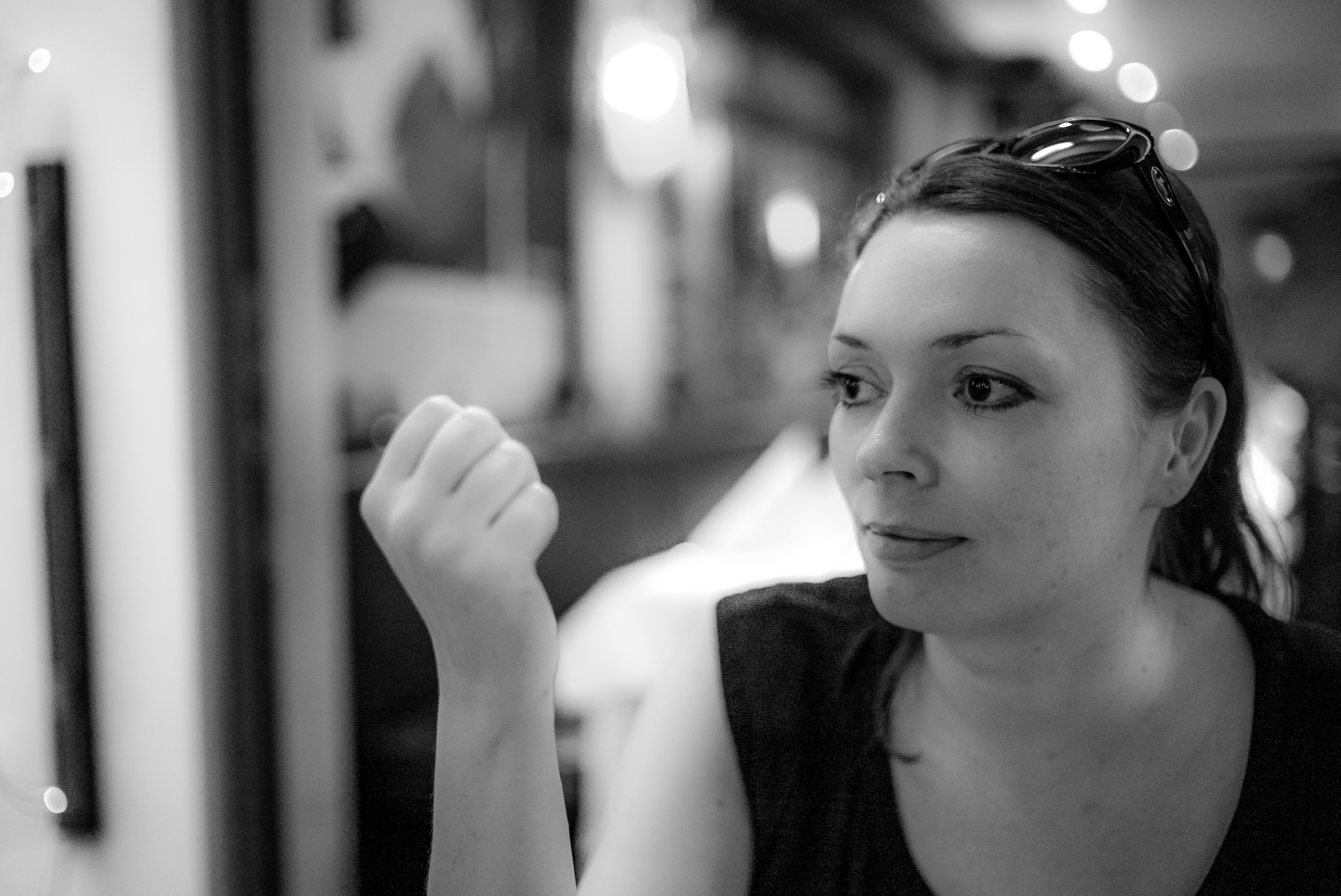 Zoe Beck, Mai 2014, Foto: Mario Sixtus